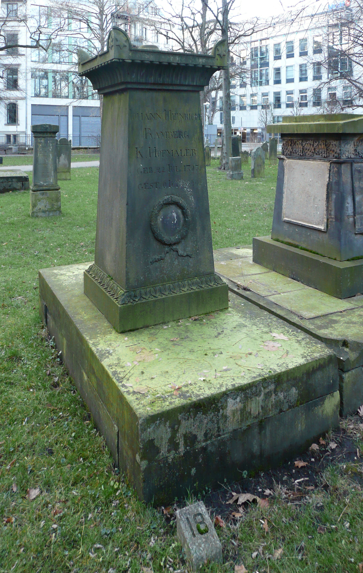 Grab von Johann Heinrich Ramberg auf dem Gartenfriedhof